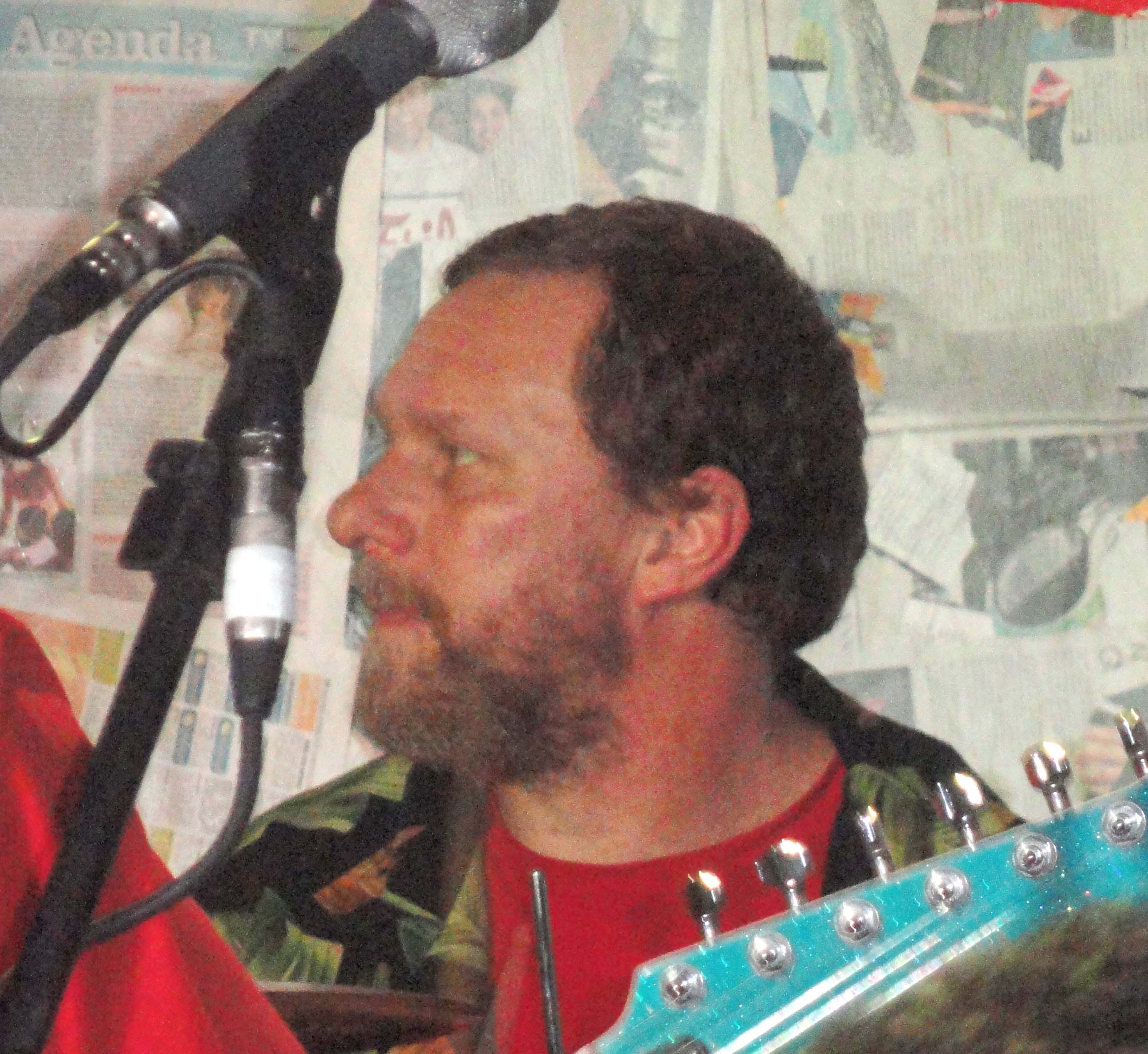 Graforréia Xilarmônica no bar Ocidente - Alexandre Birck